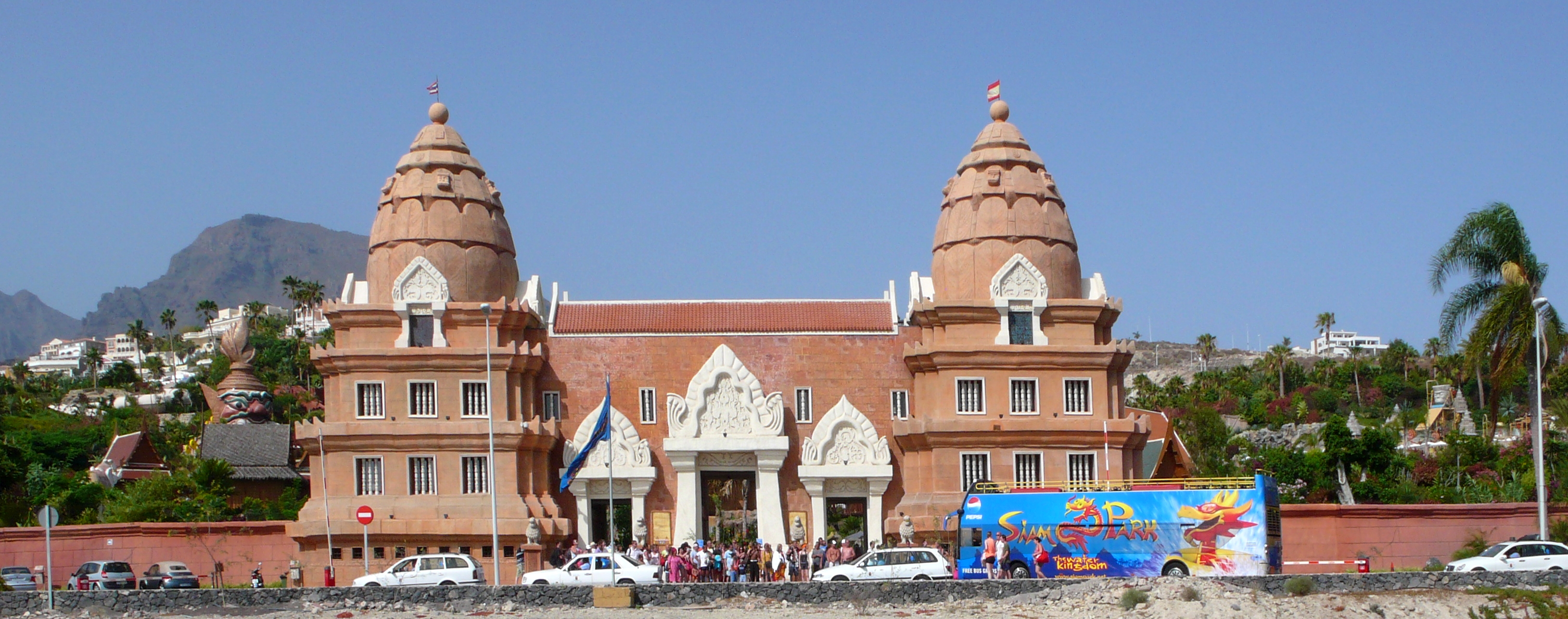 Entrada al parque acuático Siam Park, Adeje, Tenerife.